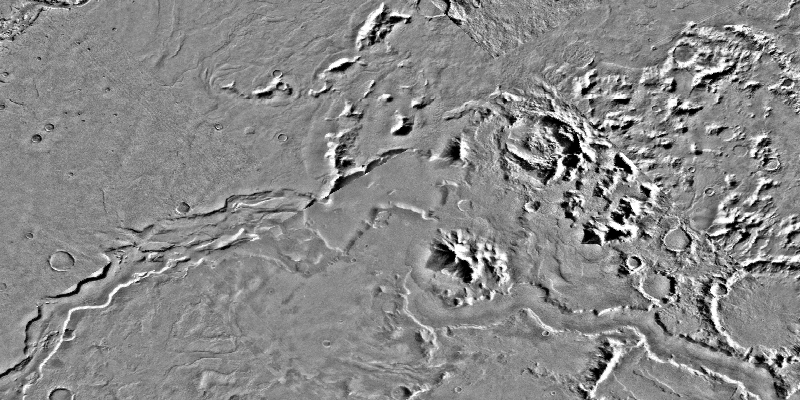 Centauri Montes on Mars